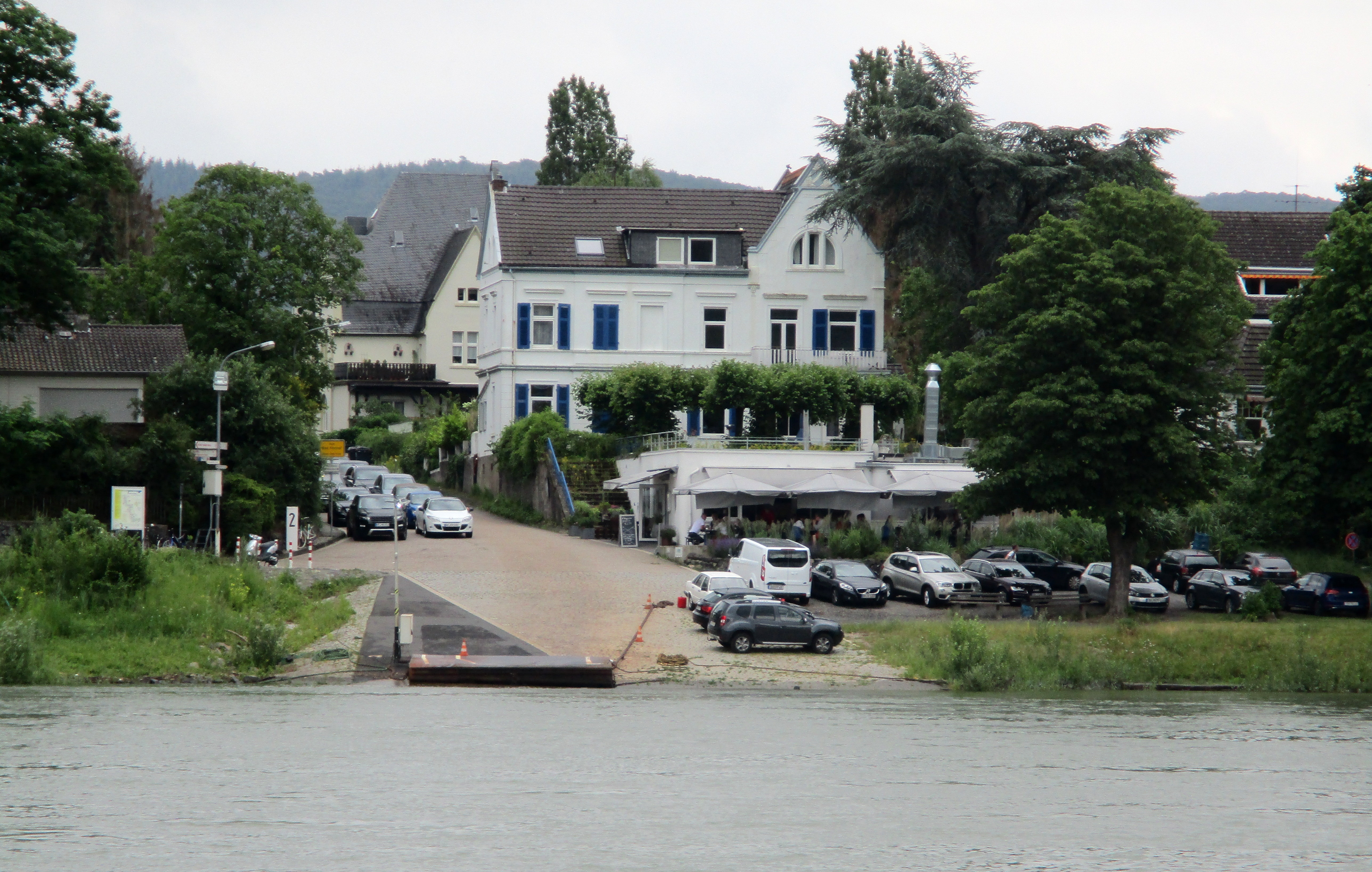 Der Fährplatz Lohfelderfähre der Rheinfähre Bad Honnef–Rolandseck, Rheinstraße, Bad Honnef